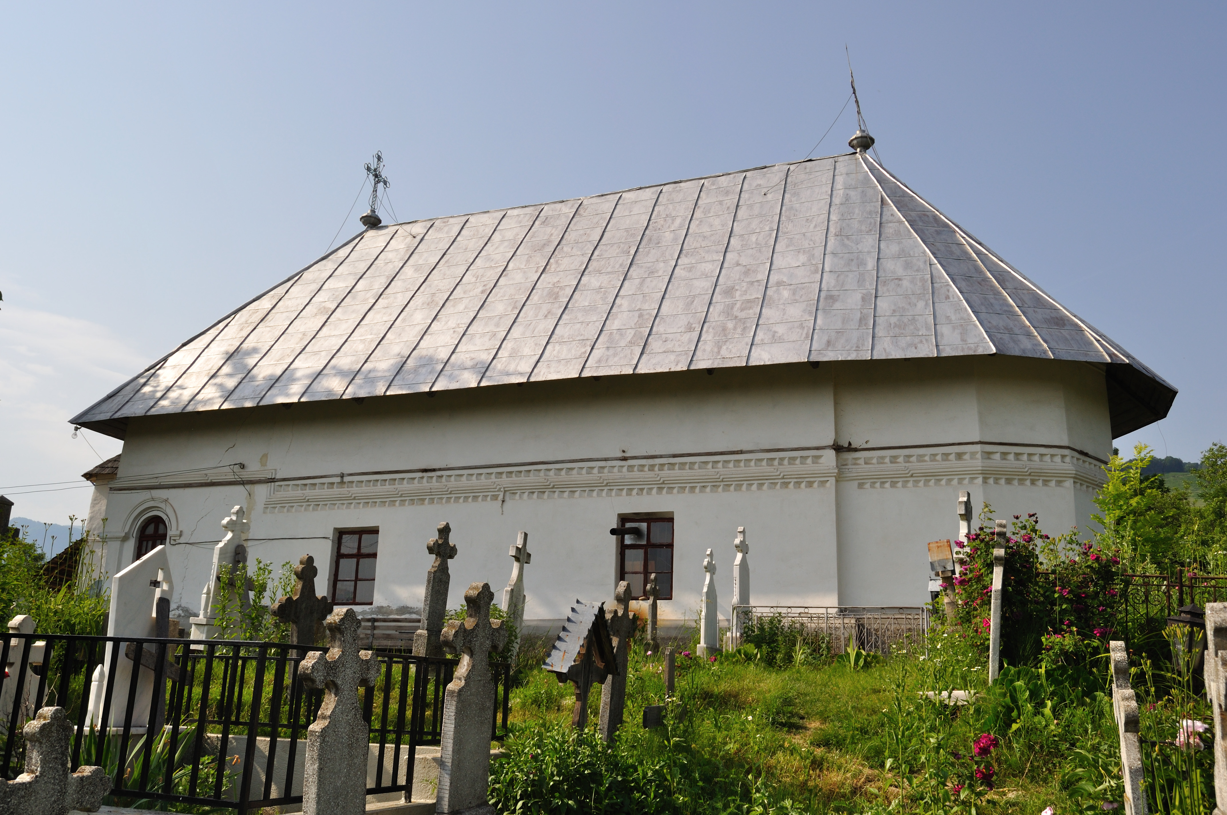 Biserica „Intrarea în Biserică a Maicii Domnului” din satul Bărbătești, cătunul Mierlești, județul Vâlcea